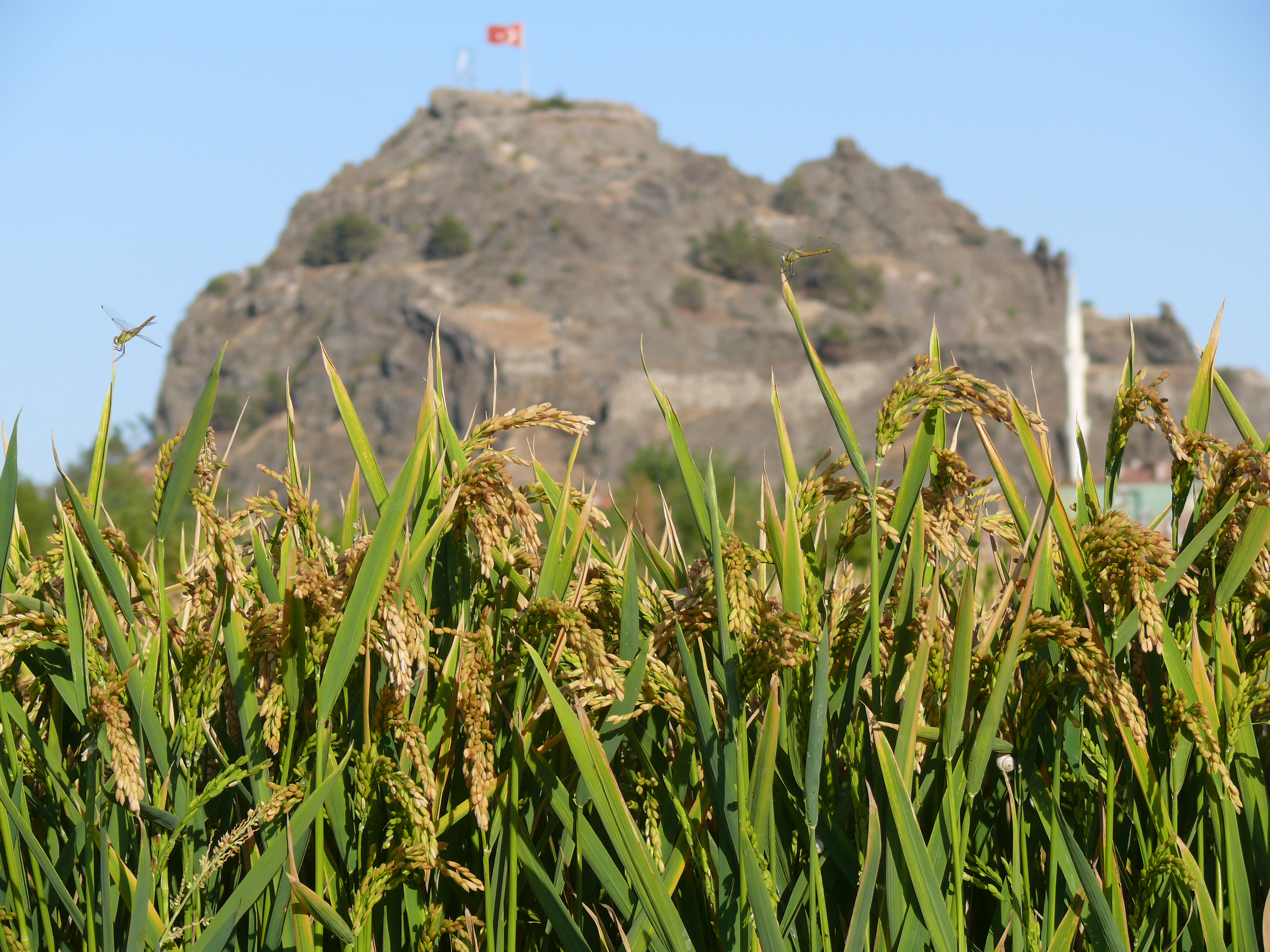 Osmancık Çeltik Tarlasından Görünüm